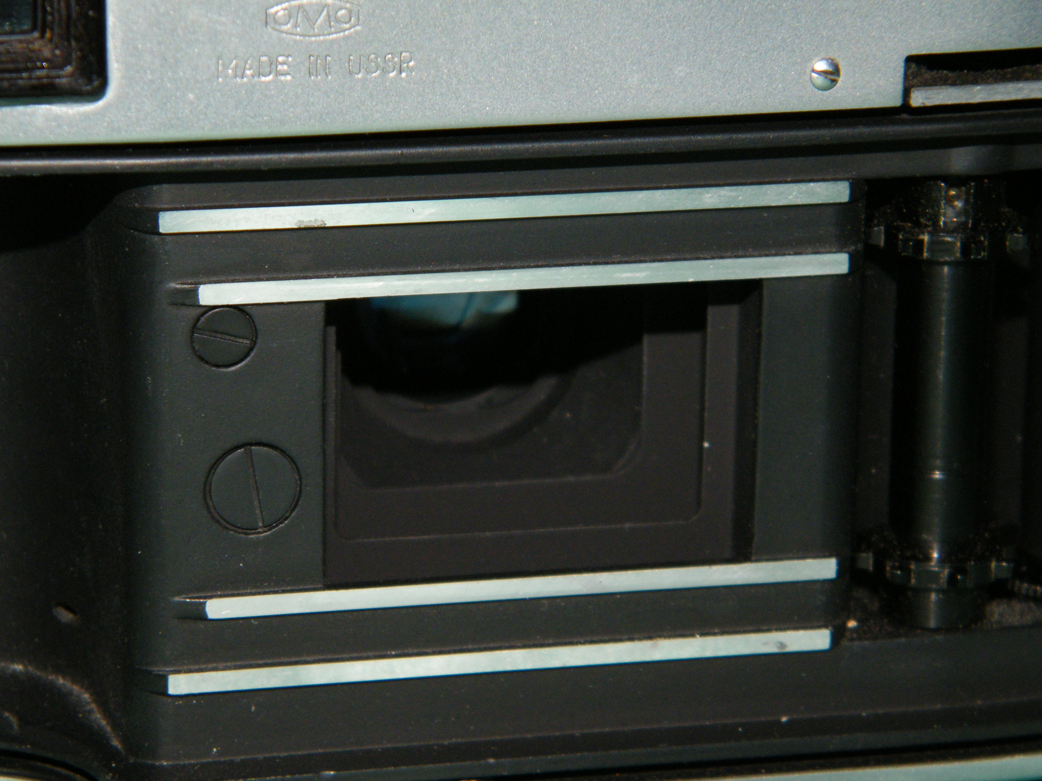 Светозащита фотоаппарата "Сокол"